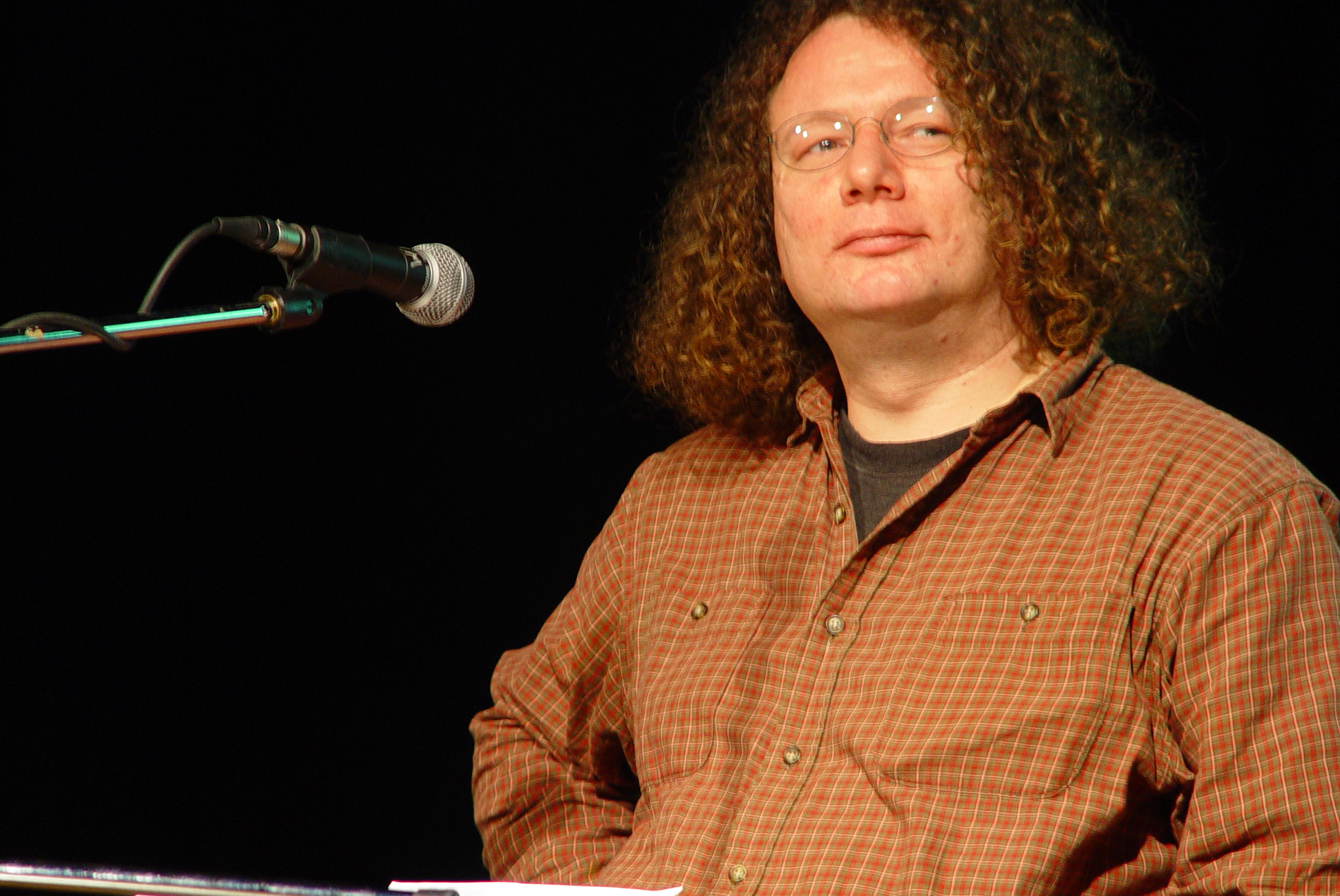 Ingo Schulze am 19. Dezember 2004 im Theaterhaus Mitte (Berlin)